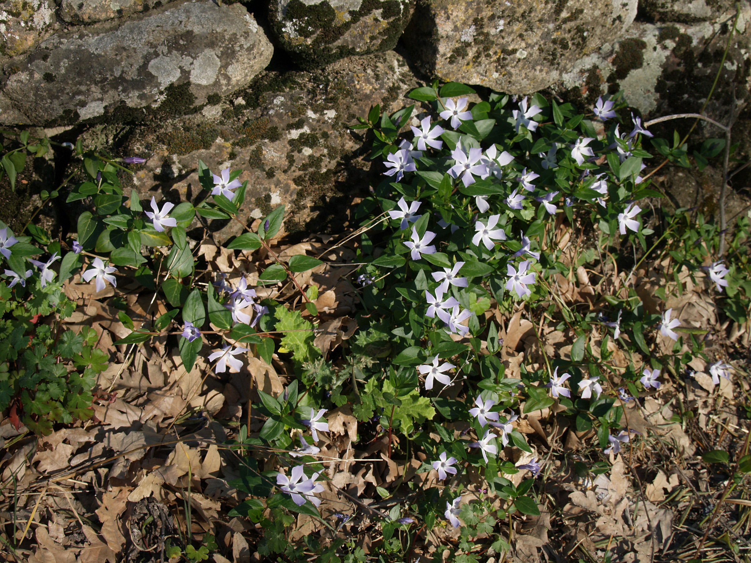 Vinca difformis Pourret. Losar de la Vera, Cáceres, España.